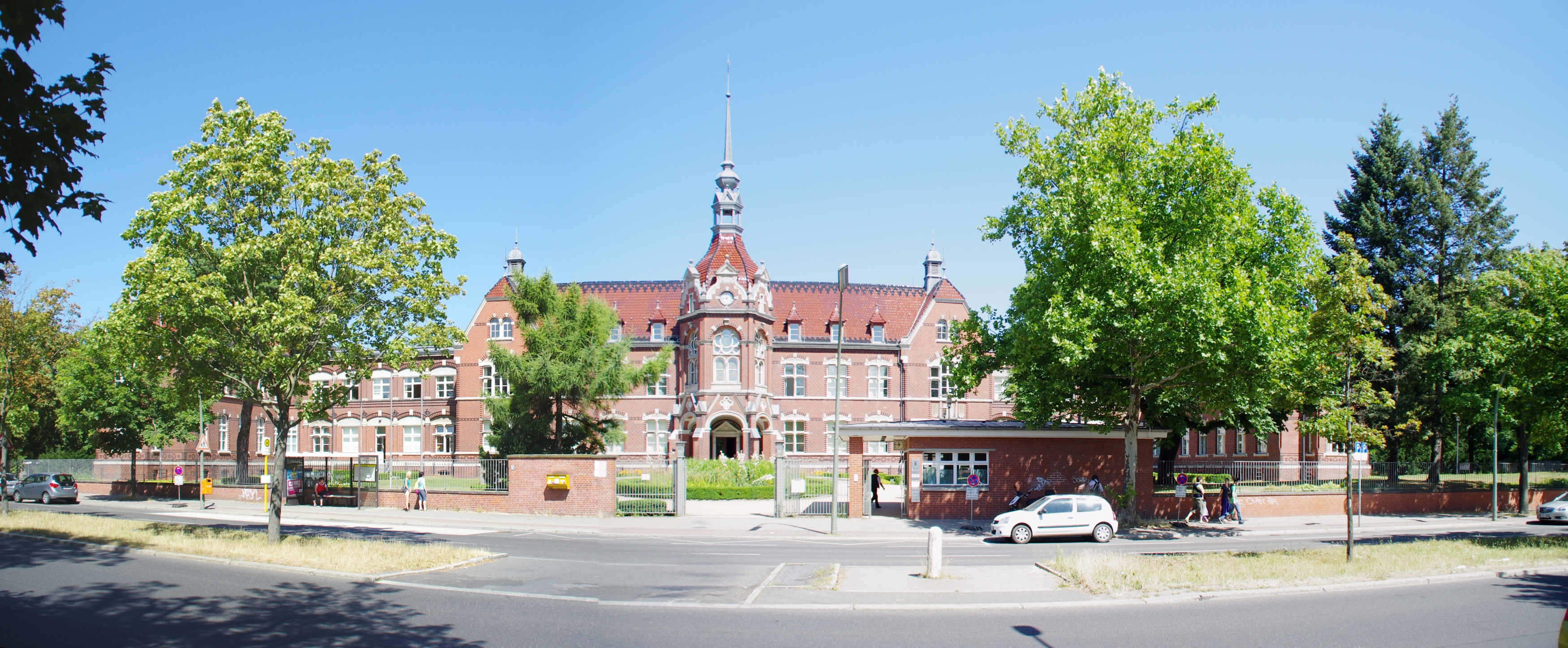 Berlin-Neukölln. Das ehemalige Kreiskrankenhaus Teltow, ab 1924 Städtisches Krankenhaus Britz, steht unter Denkmalschut.